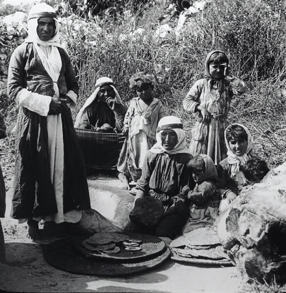 דרוזיות אופות פיתות